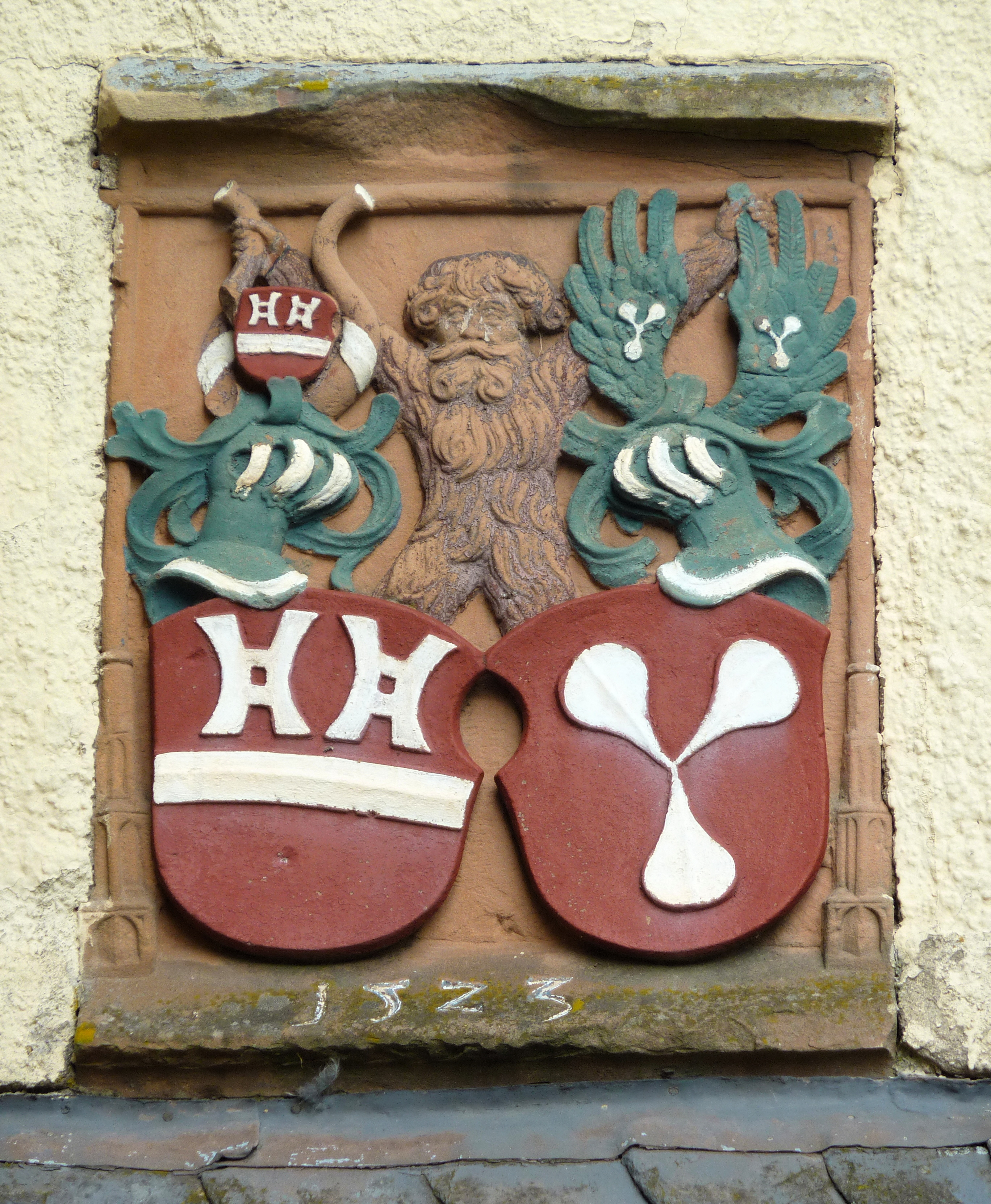 Kreuztal (Kreis Siegen-Wittgenstein/Westfalen), Ortsteil Junkernhees: Das im Jahr 1523 als Wasserschloss erbaute Schloss Junkernhees; über dem Haupteingang angebrachter Wappenstein, datiert auf 1523, mit den Wappen von Adam von der Hees und seiner Frau Margaretha Schutzbar